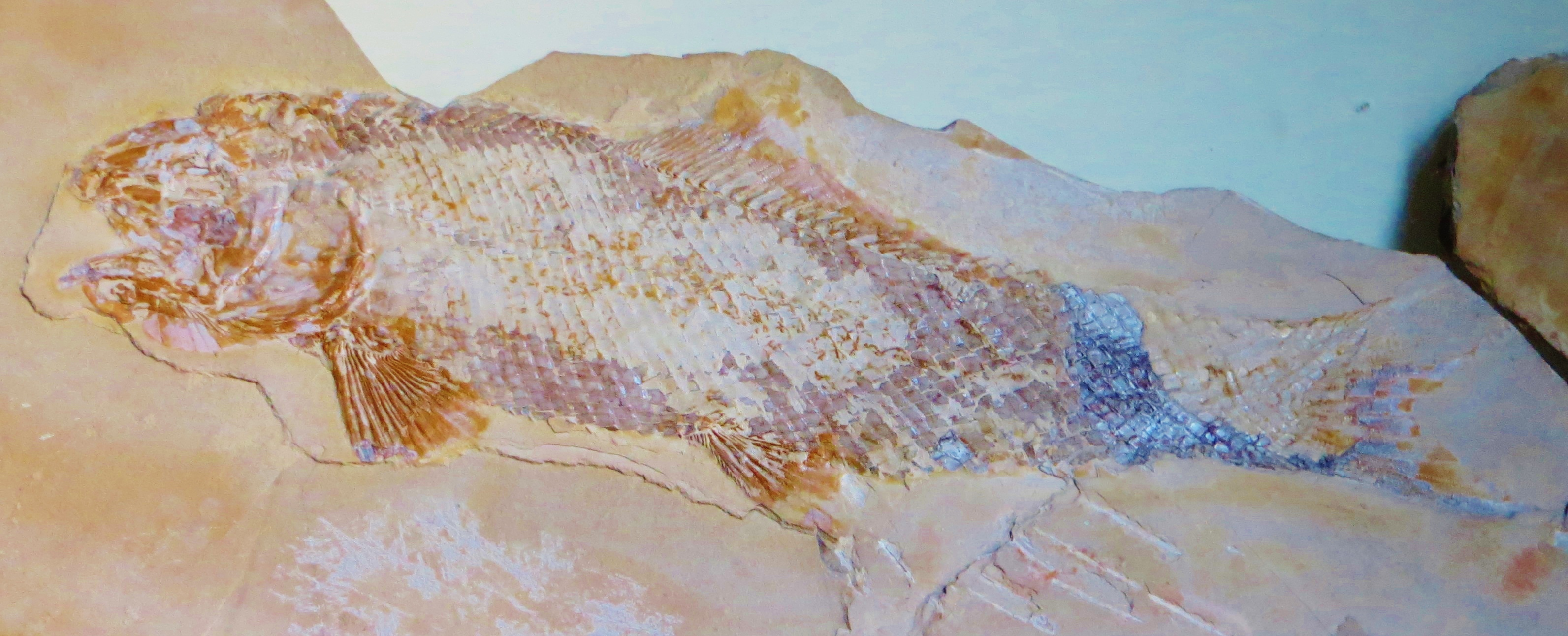 Fossil of Ophiopsis, an extinct fish - Took the picture at Teylers Museum, Haarlem